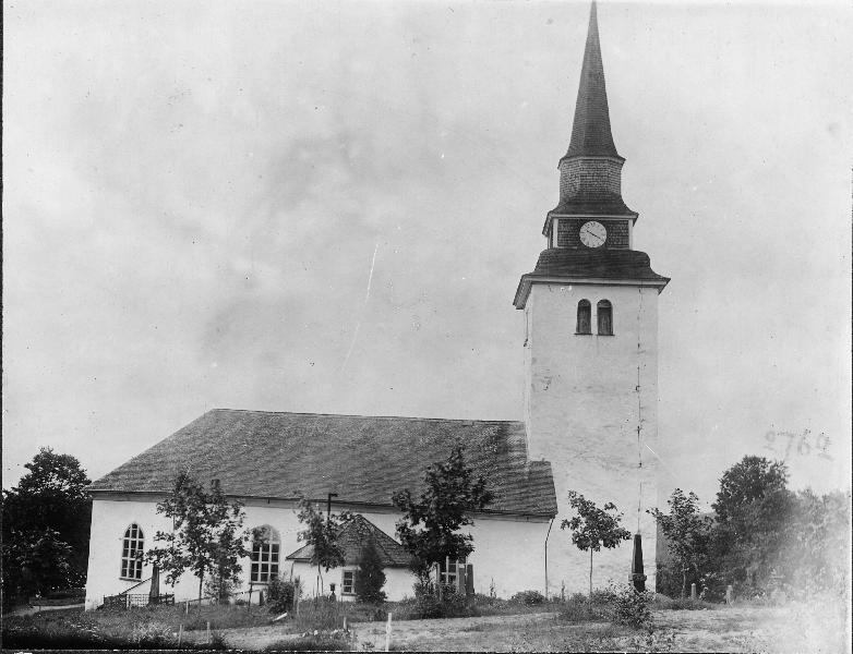 Kyrkan från nord